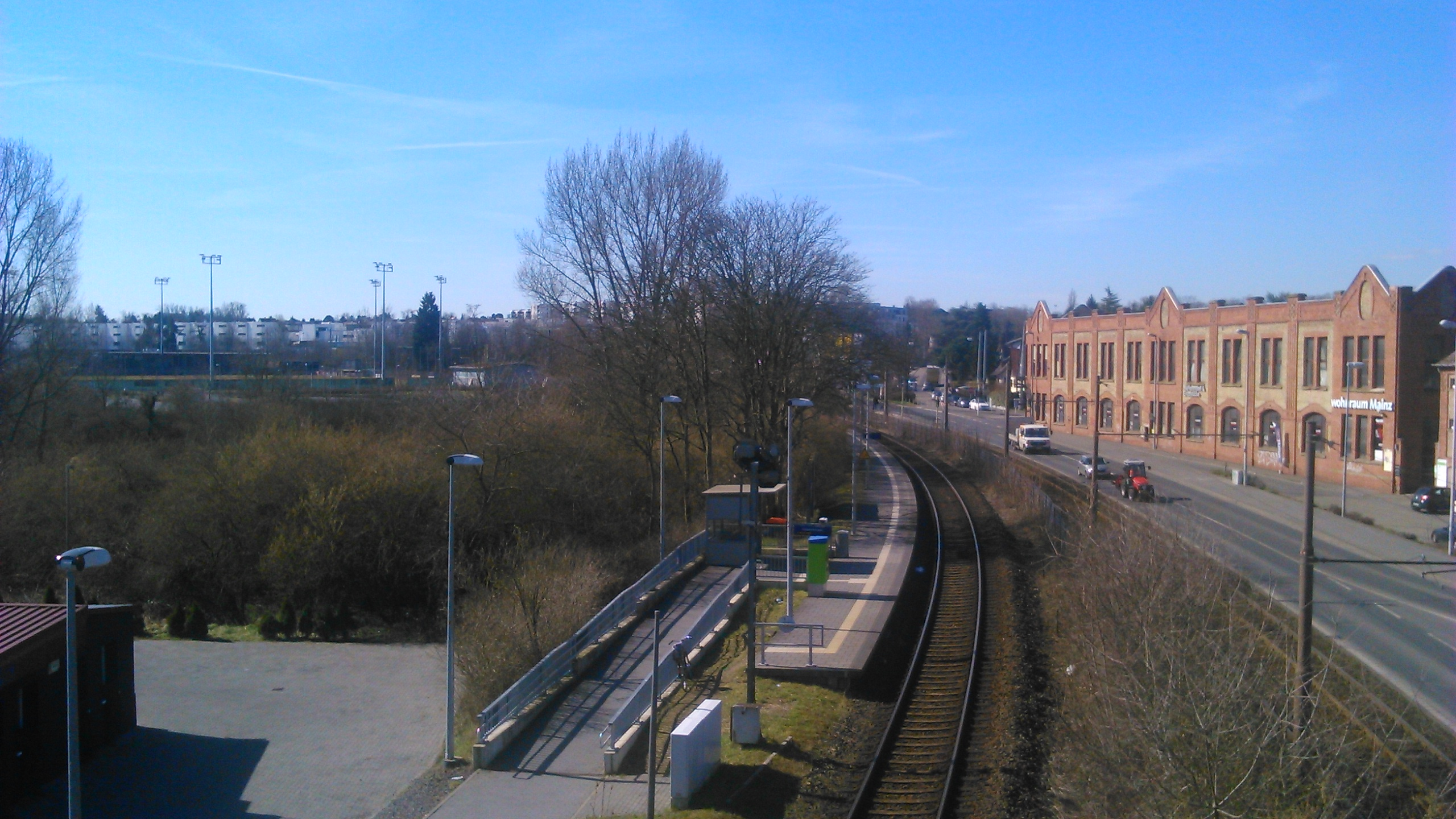 Blick auf den Haltepunkt Mainz-Waggonfabrik, im Hintergrund der Stadtteil Gonsenheim